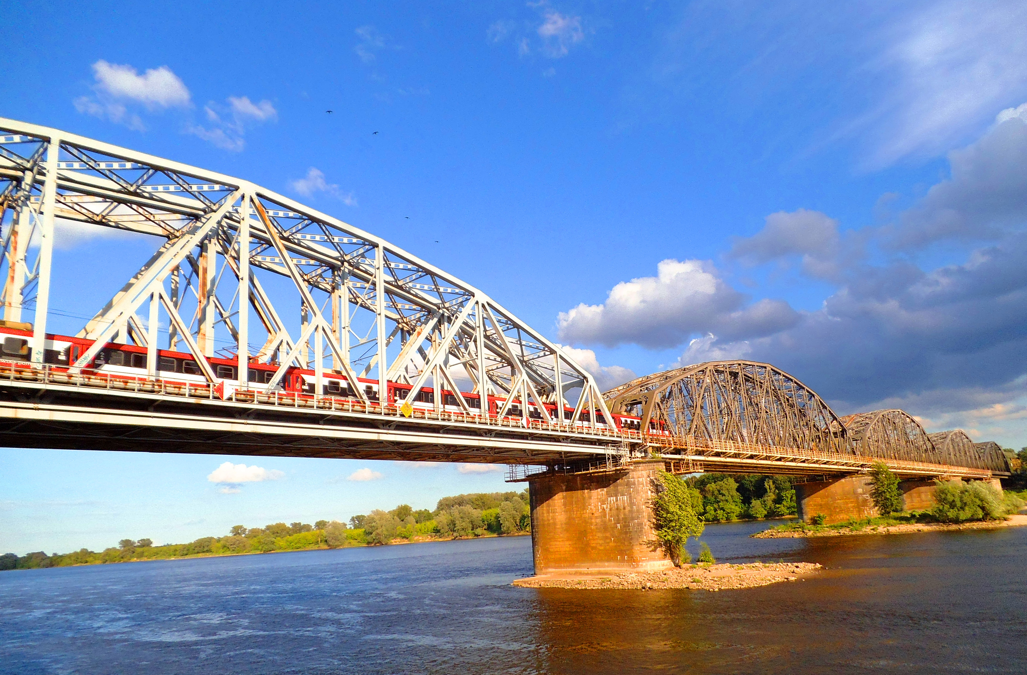 Most kolejowy im. Ernesta Malinowskiego w Toruniu